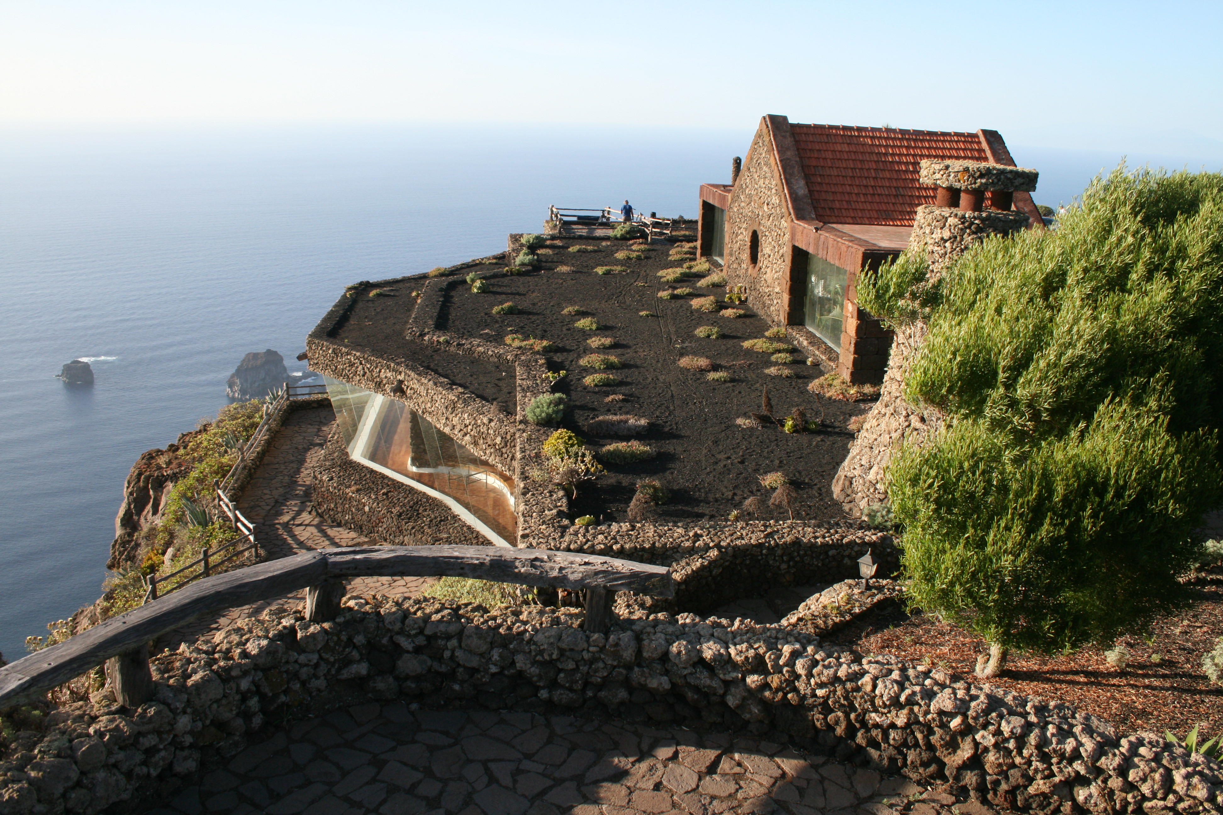 El Mirador de la Peña con vista a los Roques de Salmor This is an image of the Biosphere Reserve or a Geopark: Isla de El Hierro